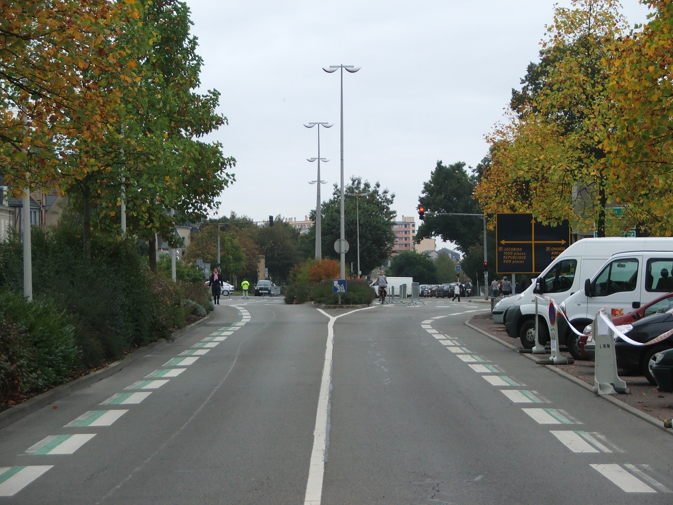 Le quai Louis Blanc au Mans en bordure de Sarthe.